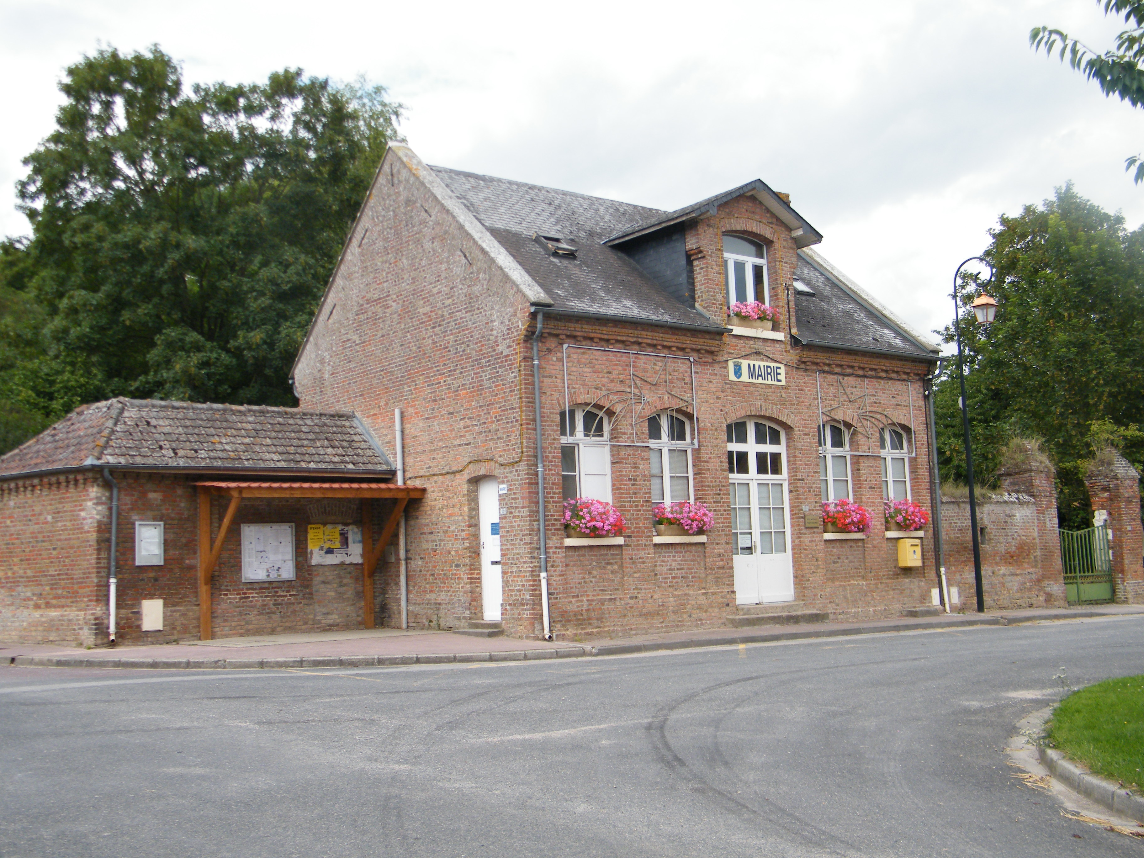 Mairie.